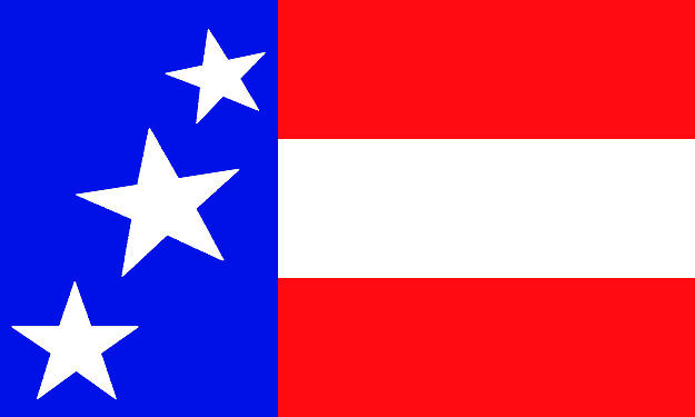 Propuesta de bandera de Tarapacá. Azul: Simboliza el cielo y el mar de la región de Tarapacá. Rojo: La primera franja simboliza a los soldados caídos en la guerra del pacifico. La segunda franja simboliza a los tarapaqueños. Blanco: la línea blanca simboliza el salitre y las cumbres nevadas de toda la región de Tarapacá. Las 3 estrellas simbolizan el cinturón de orión, o las tres marias como se le conoce. Así mismo, simboliza los 3 países que alguna vez ejercieron y ejercen soberanía sobre la región. La estrella de la izquierda representa al Perú, la del centro representa a Chile, y la de la derecha representa a España.